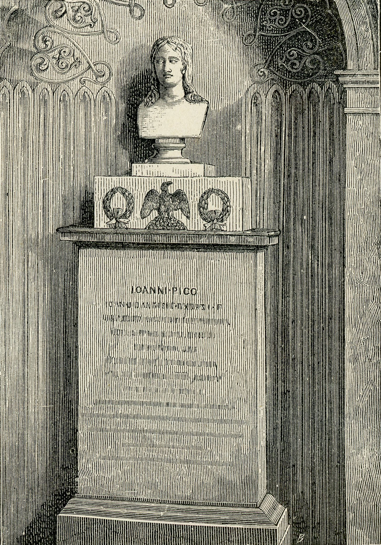 Mirandola: monumento a Giovanni Pico nella chiesa di San Francesco (xilografia).